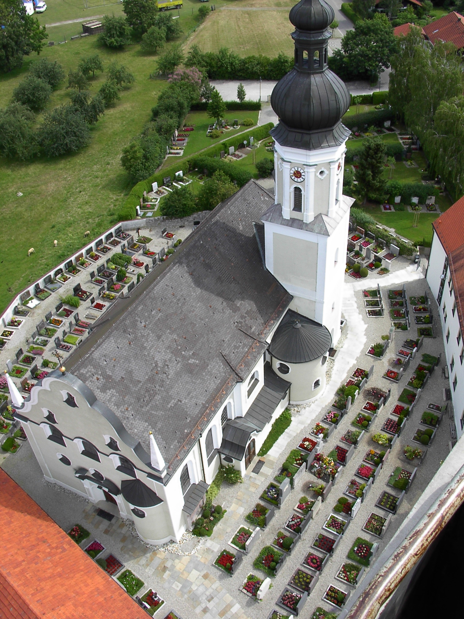 Luftaufnahme der Kirchhamer Pfarrkirche St. Martin.